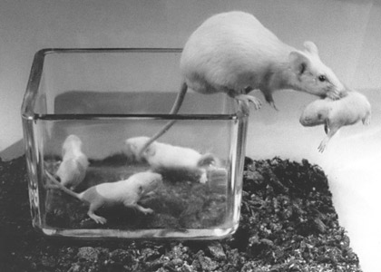 Hausmaus (Mus musculus domesticus) trägt eigene Nestlinge aus einer Glasküvette ein